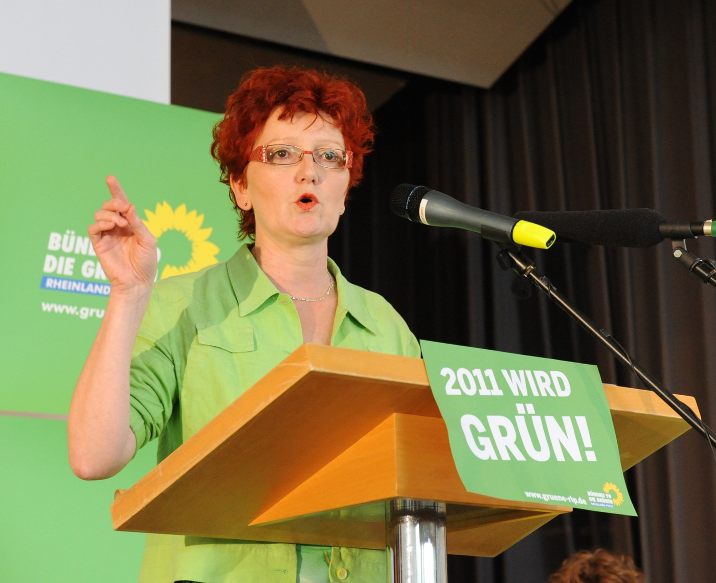 Ise Thomas bei der Landesdelegiertenversammlung von Bündnis 90/Die Grünen Rheinland-Pfalz